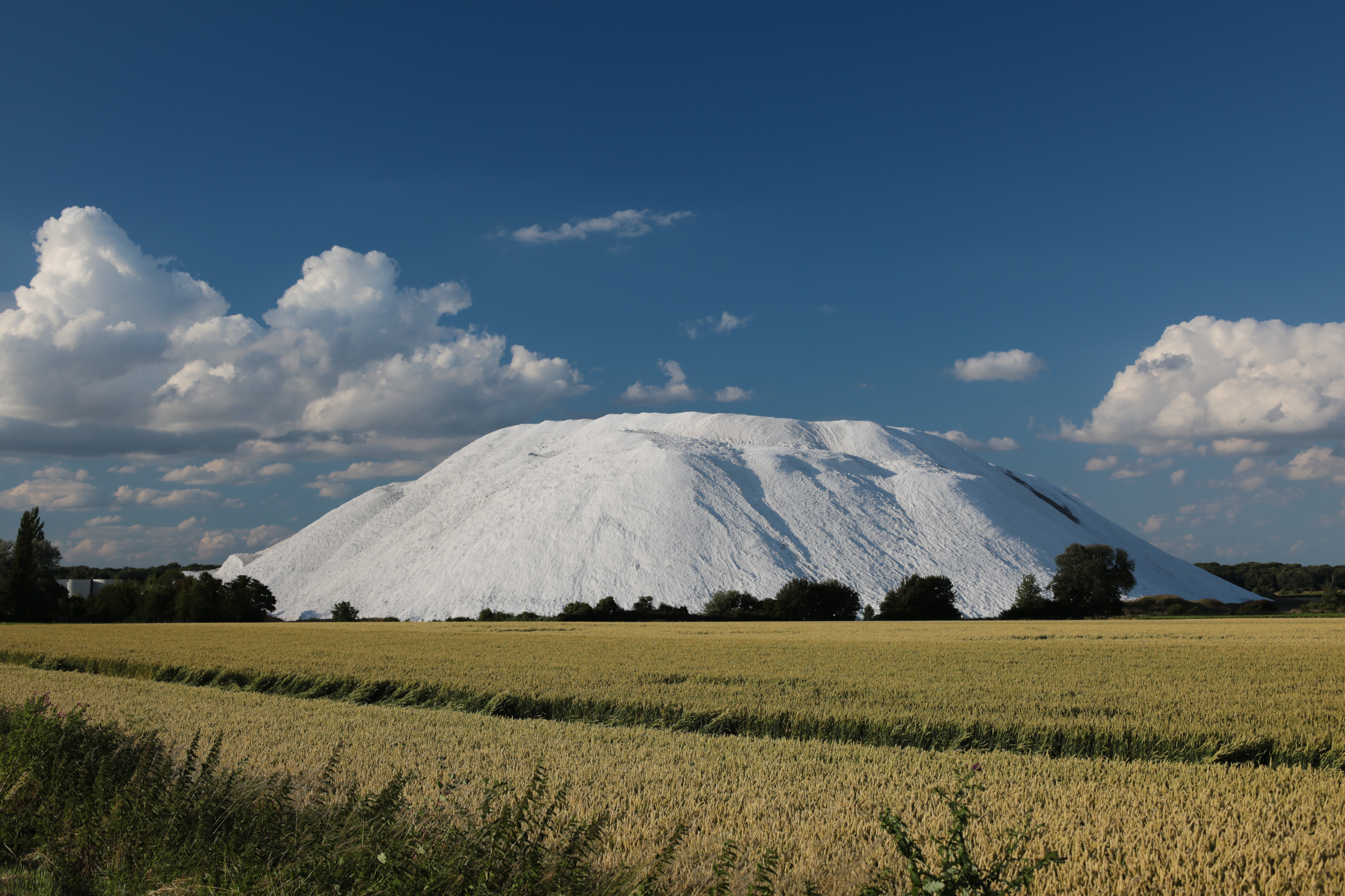 Die Abraumhalde vom Kalibergwerk Siegfried in Giesen bei Hildesheim